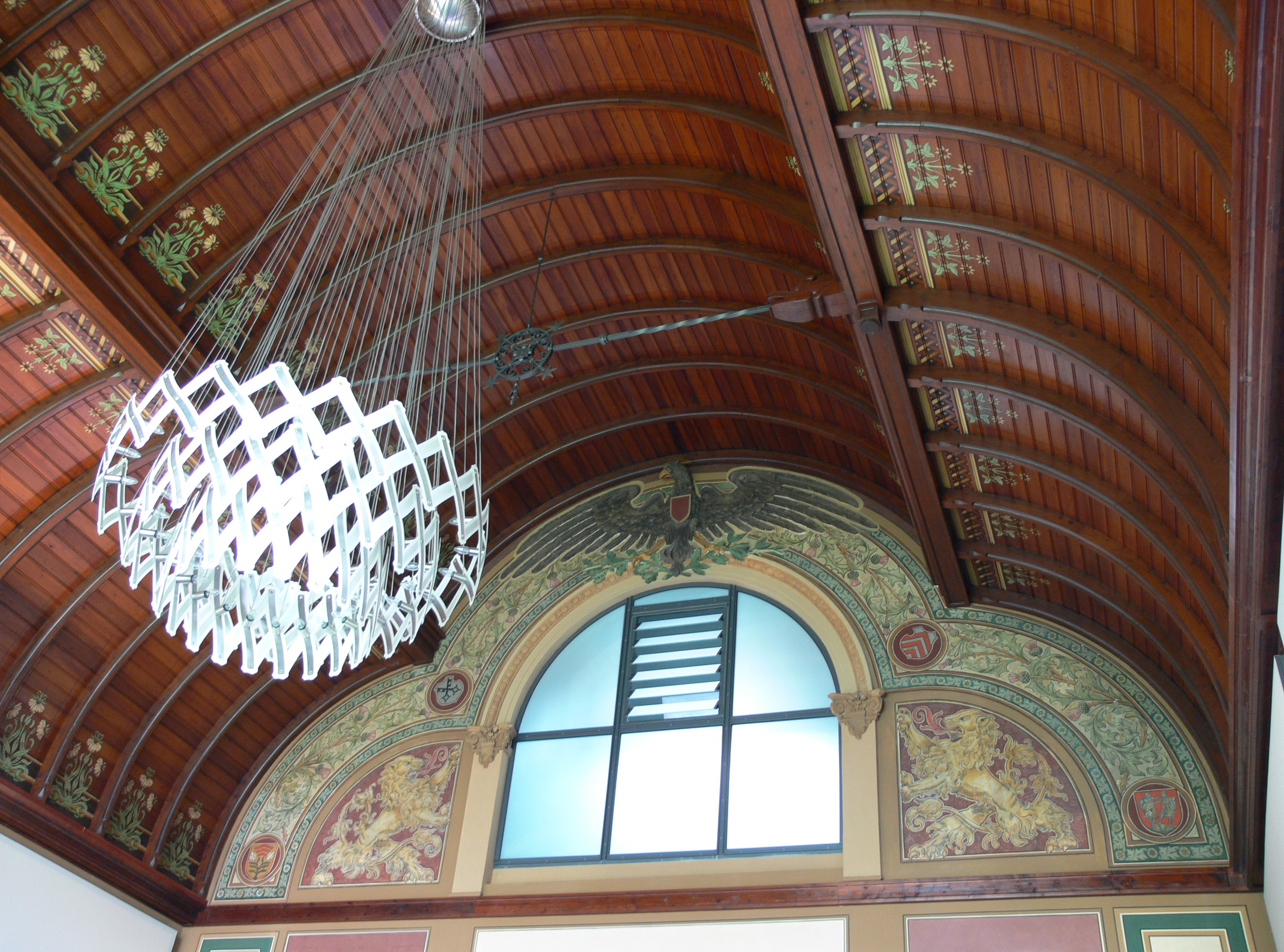 Herford, Amtshausstraße 2, Decke des Altes historischern Saals im Alten Kreishaus